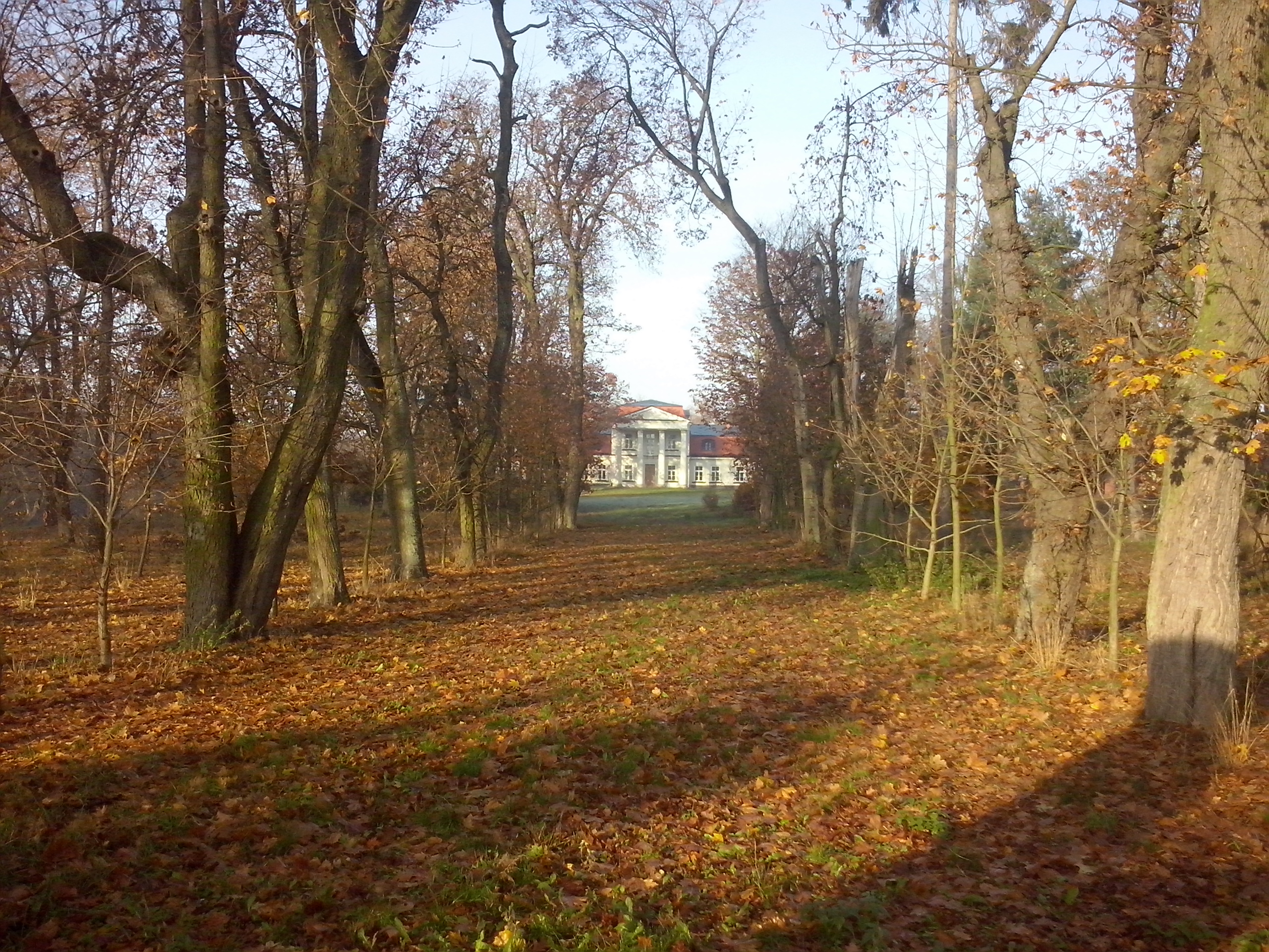 Zatory (gm. Zatory, pow. Pułtusk) - dwór